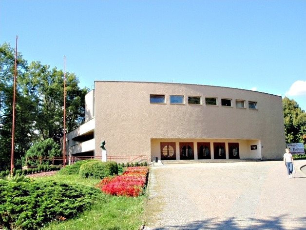 Divadlo (Ústí nad Orlicí), Husova 1062, Ústí nad Orlicí